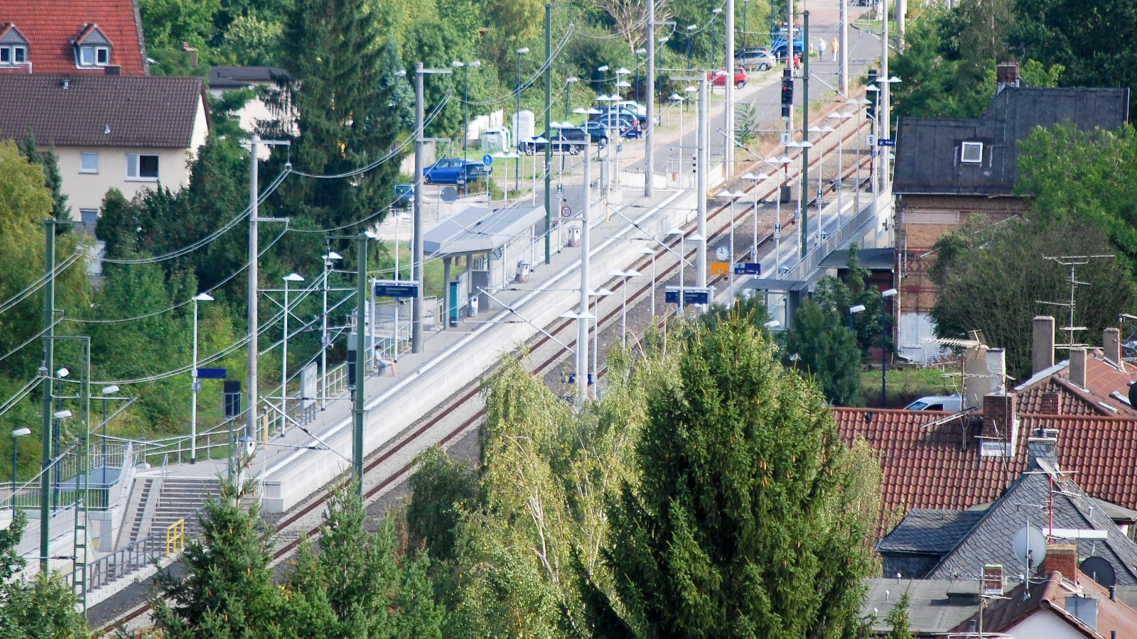 S-Bahnhof Offenbach-Bieber vom Bieberer Aussichtsturm fotografiert